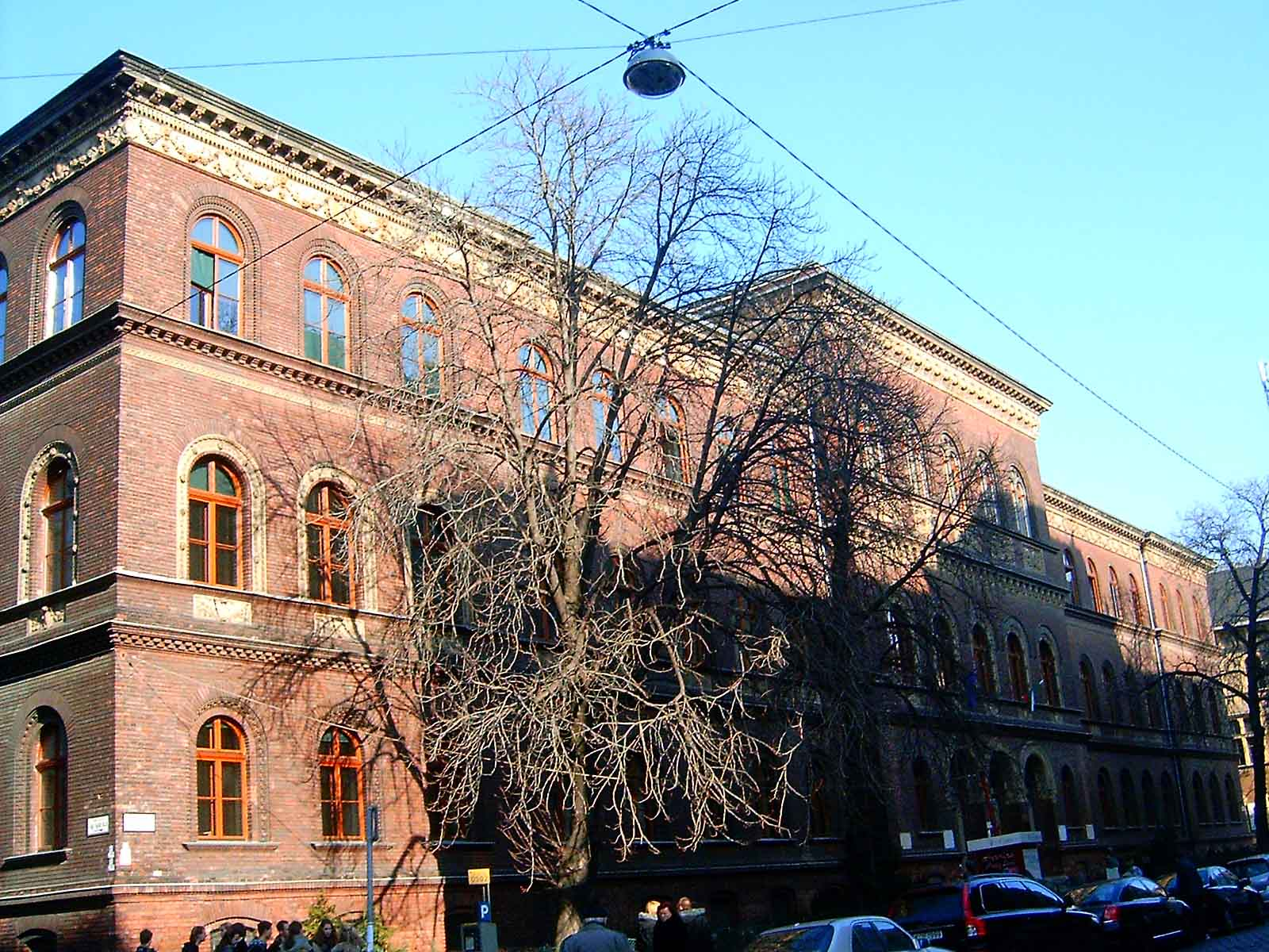 Markó utcai reáliskola (ma: Xántus János Két Tanítási Nyelvű Gimnázium és Szakgimnázium, Budapest, Markó u. 18-20. 1055)